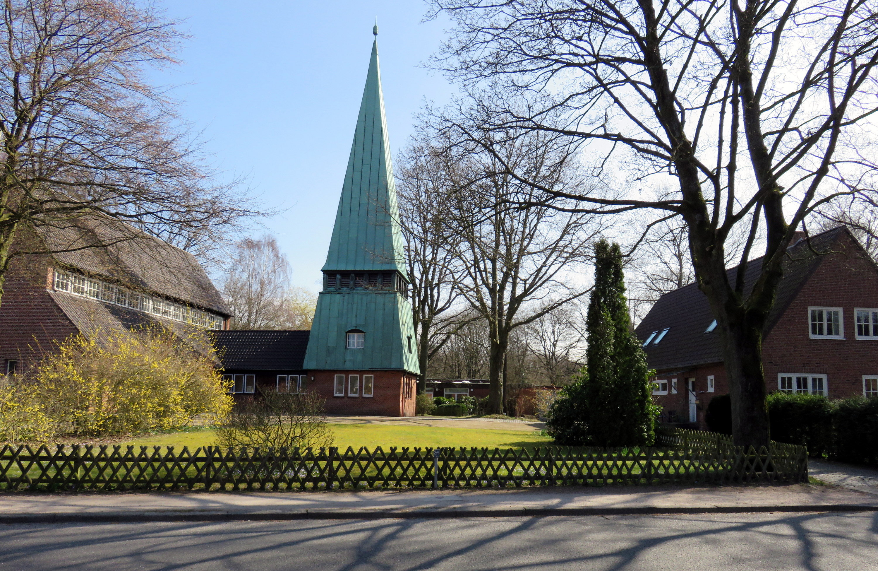 Christophorus-Kirche Poppenbüttler Stieg 25, 29 in Hamburg-Hummelsbüttel mit Gemeindehaus (Hintergrund) und Pastorat (rechts) This is a photograph of an architectural monument.